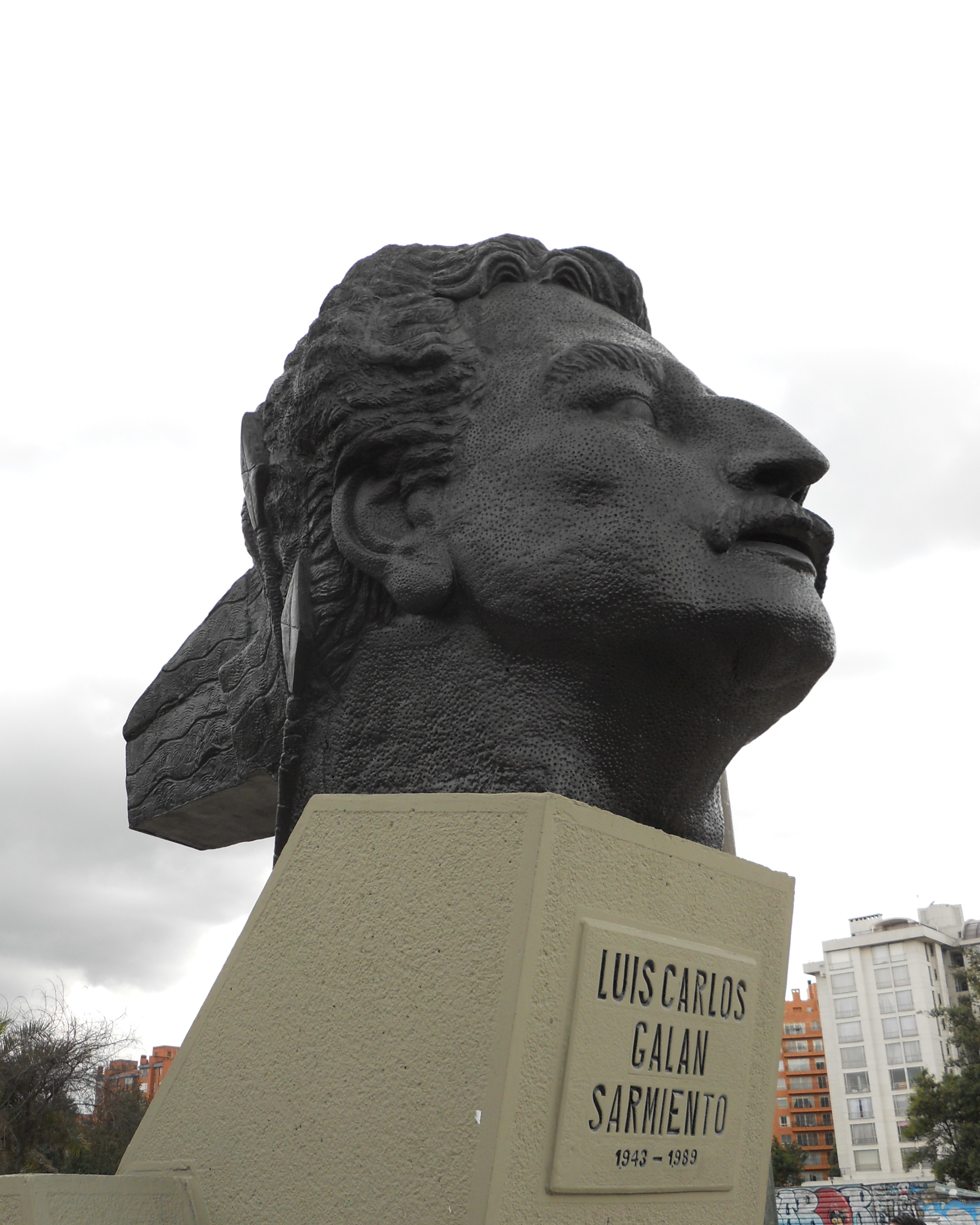 Busto de Luis Carlos Galán en la localidad de Fontibón, en Bogotá. Calle 24.